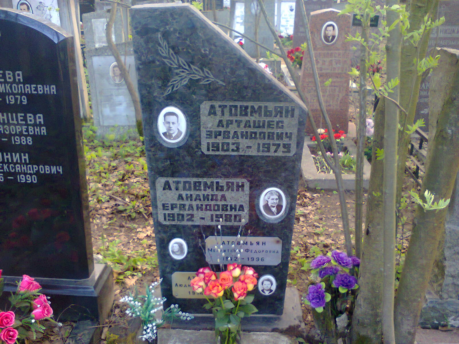 Памятник на Николо-Архангельском кладбище. Фото сделано в мае 2017года.